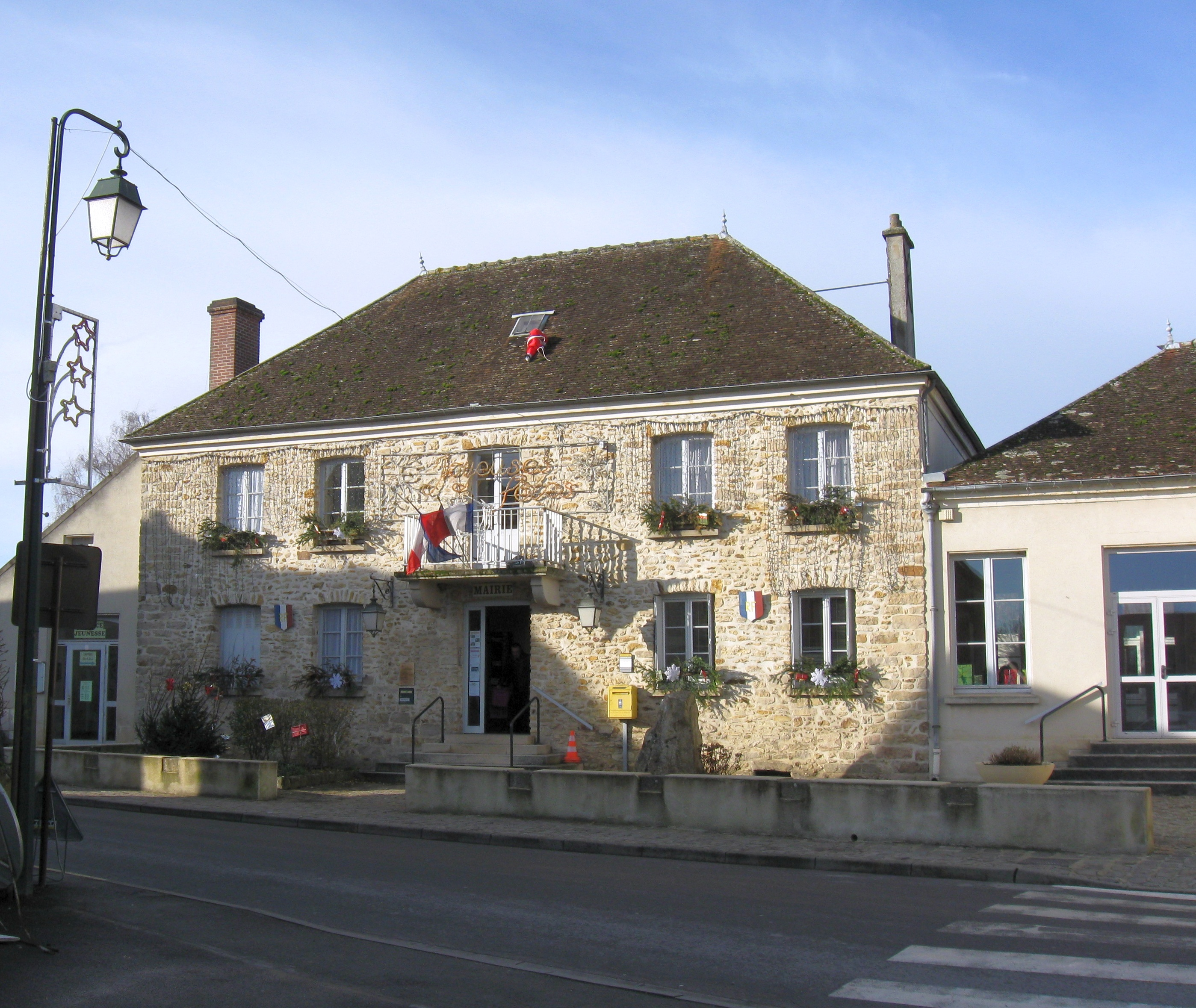 Mairie de Marles-en-Brie. (Seine-et-Marne, région Île-de-France).